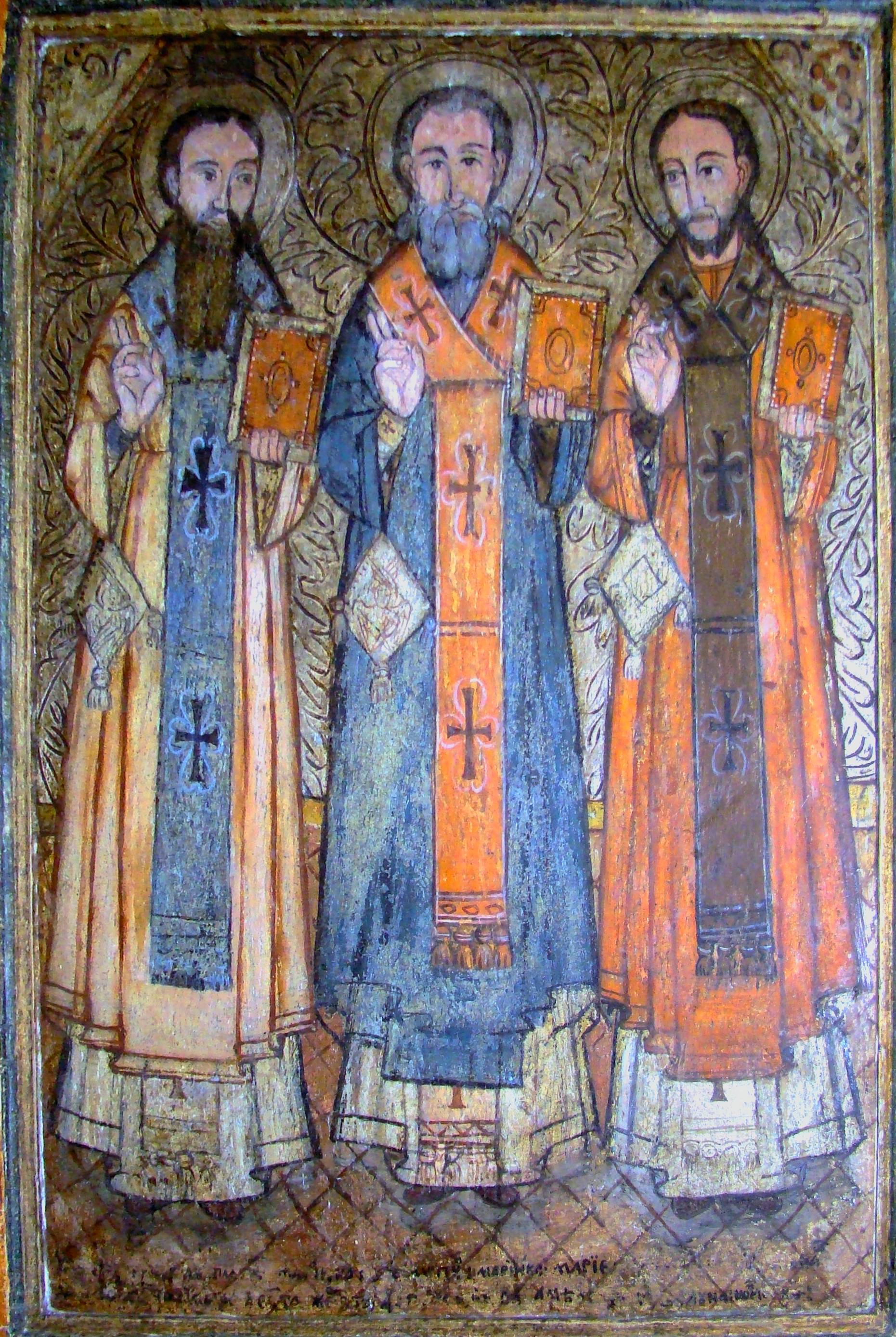 Biserica de lemn din Budești-Josani, județul Maramureș